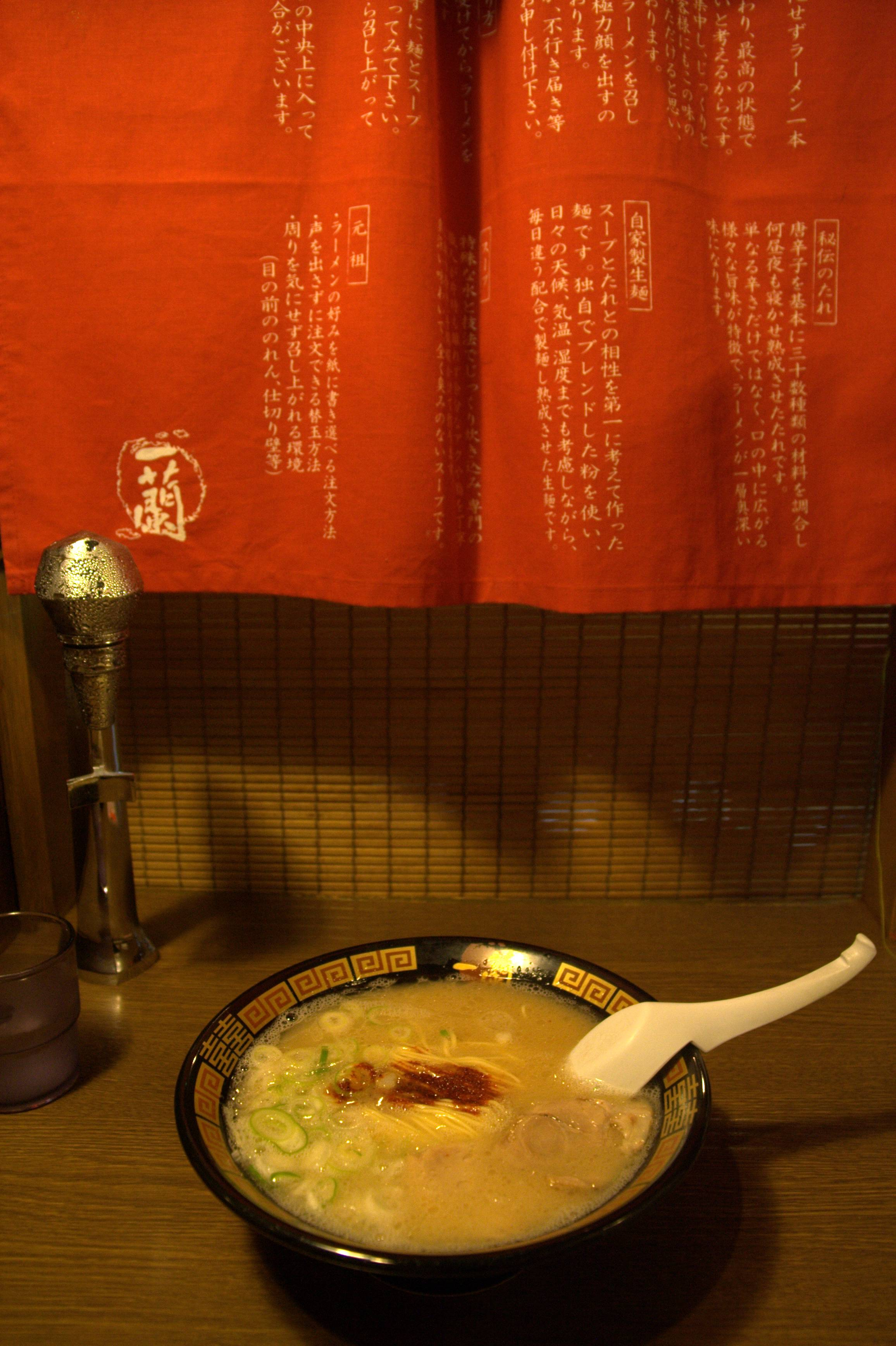 Taken at Yokohama, Japan.